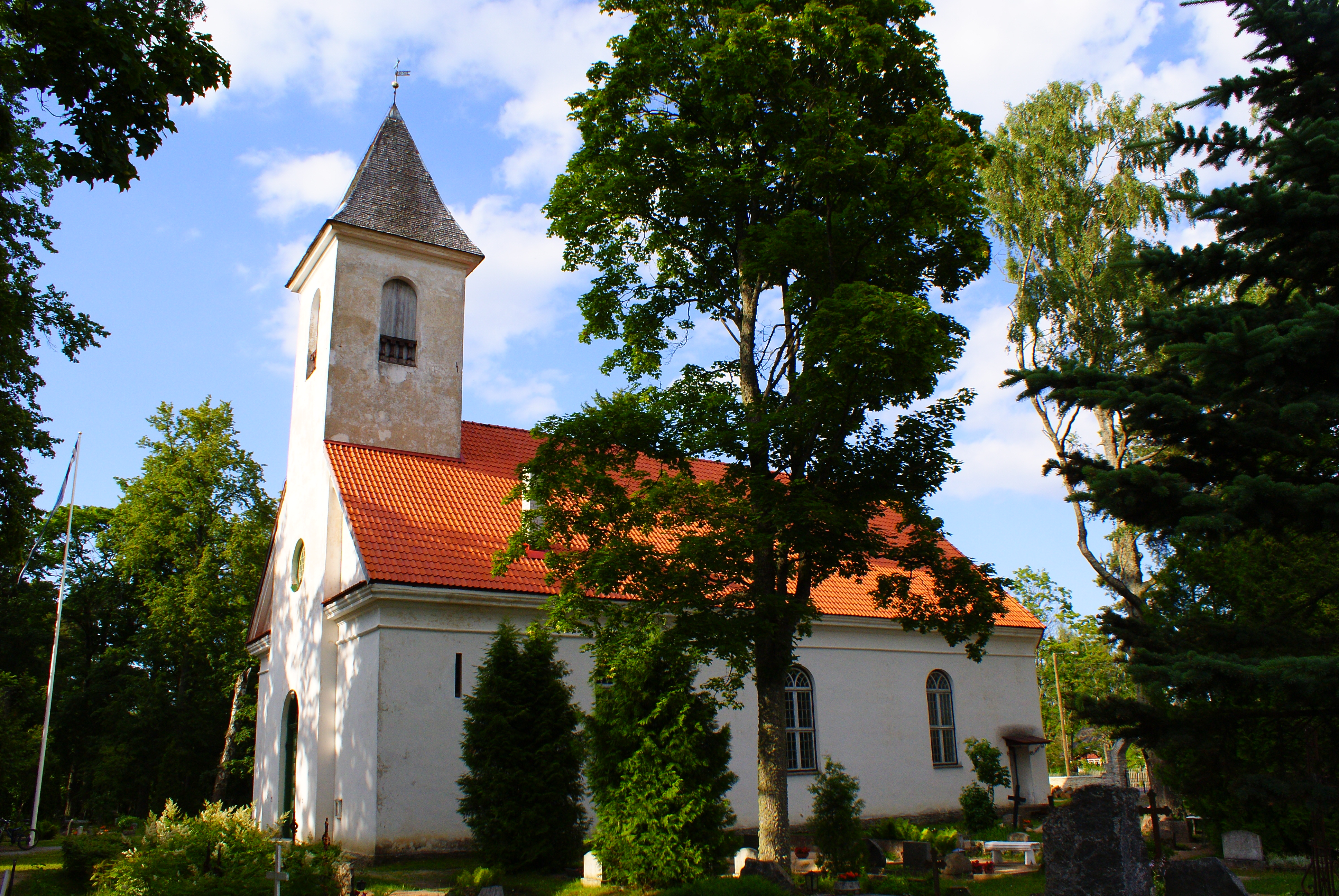 Loksa kirik